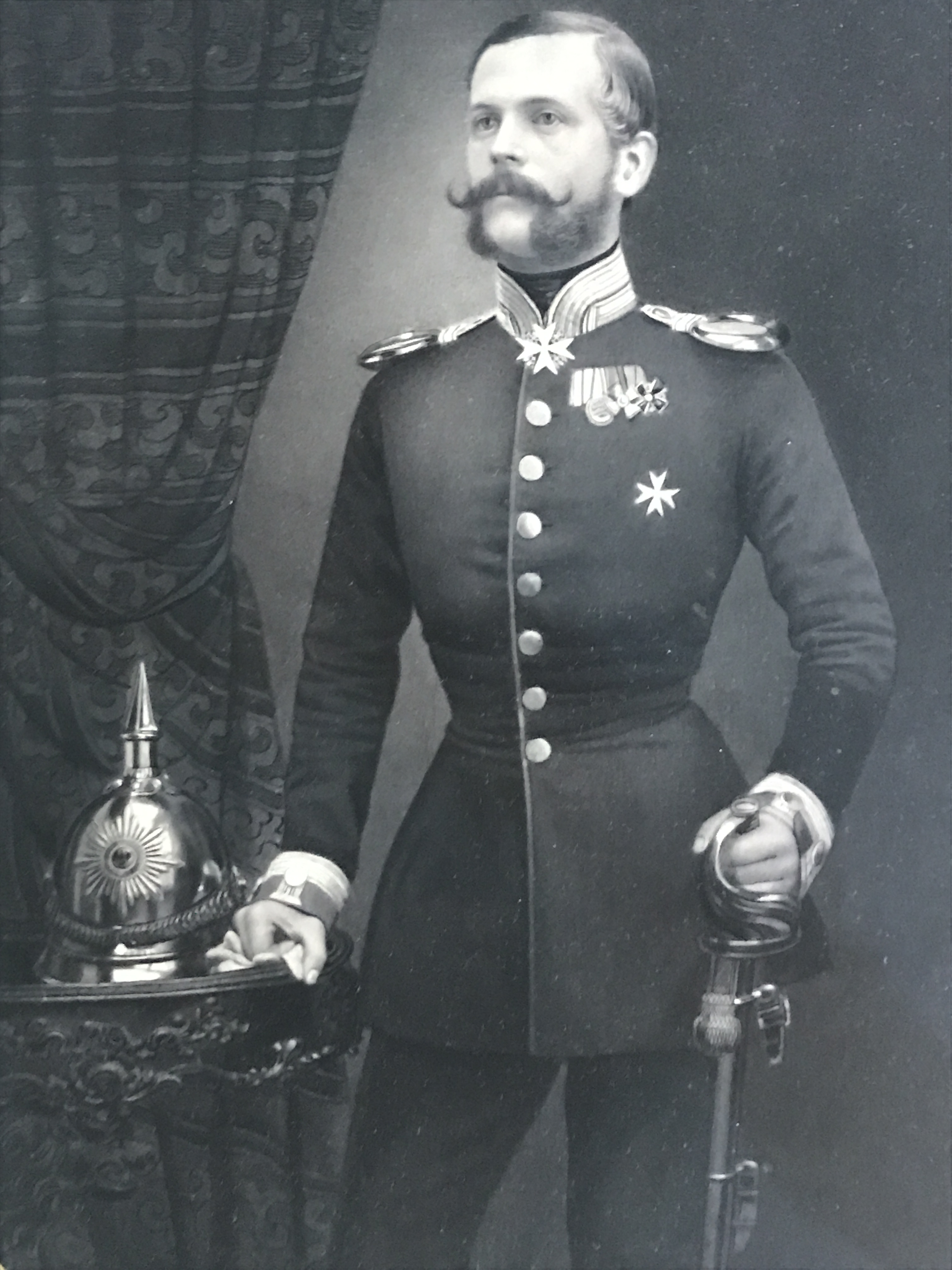 Alfred von Rauch als Rittmeister à la suite des Regiments der Gardes du Corps (verlinken) und Flügeladjutant König Friedrich Wilhelms IV., Fotografie (Silbergelatineabzug), 1858